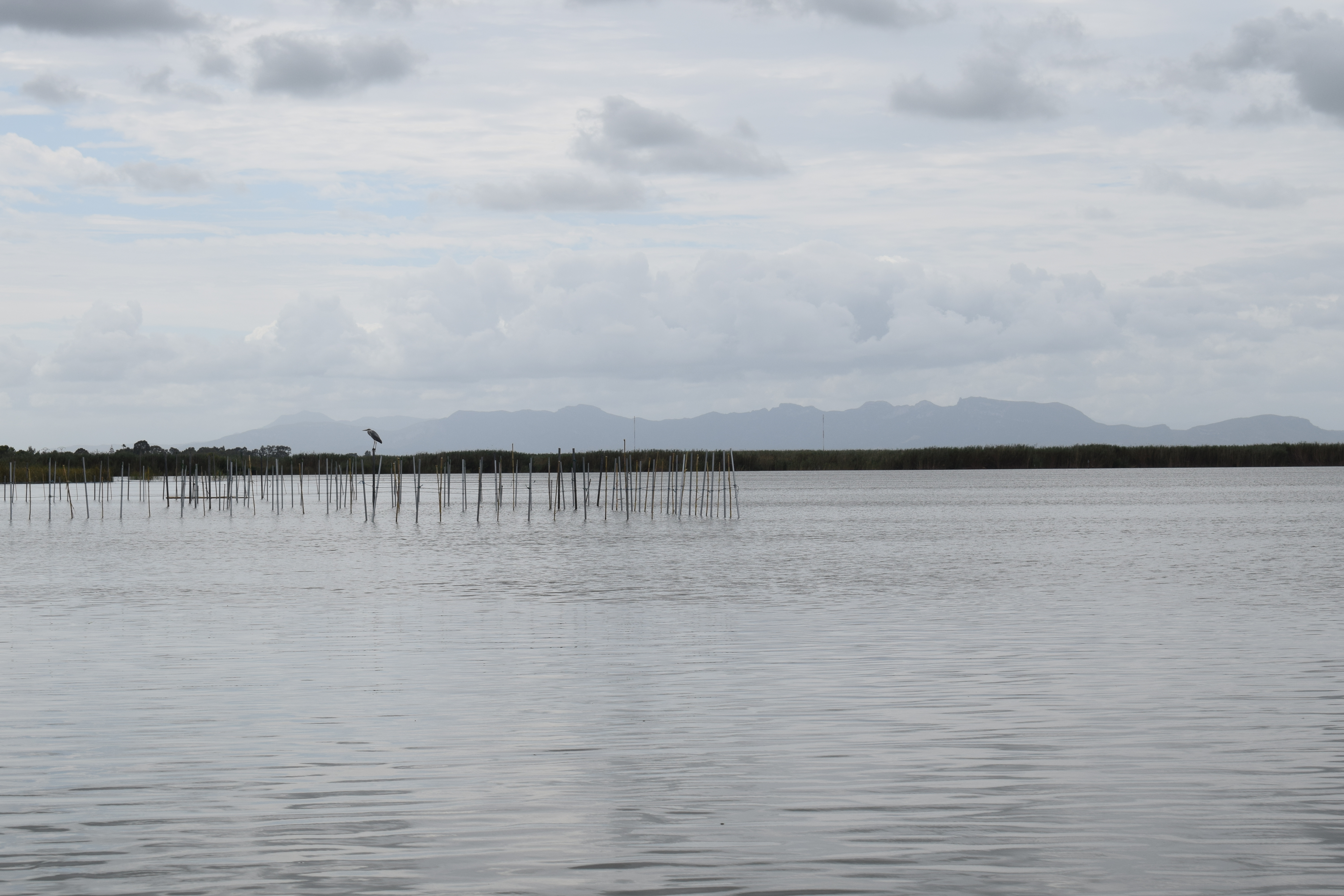 Vista de la Albufera - Valencia